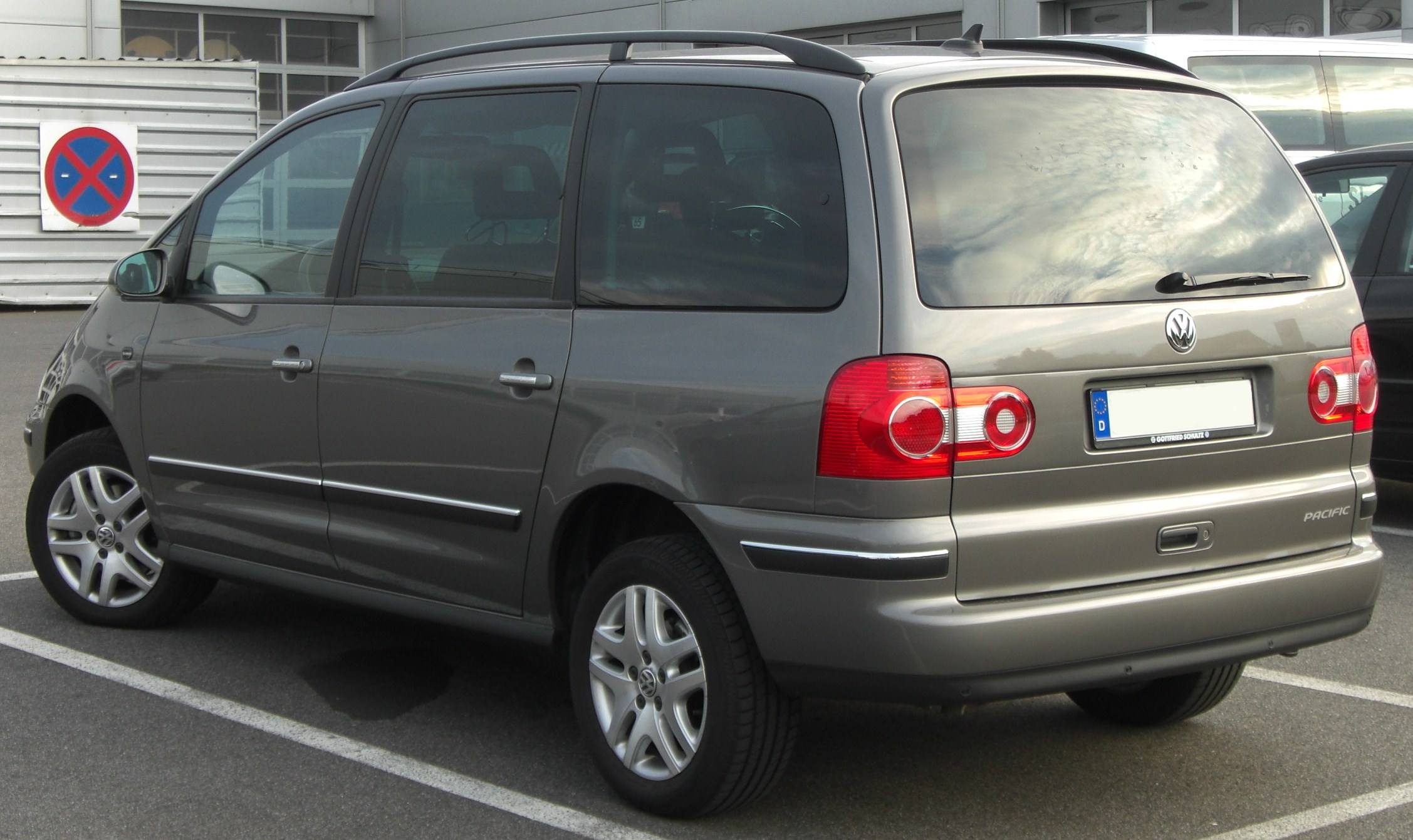 VW Sharan